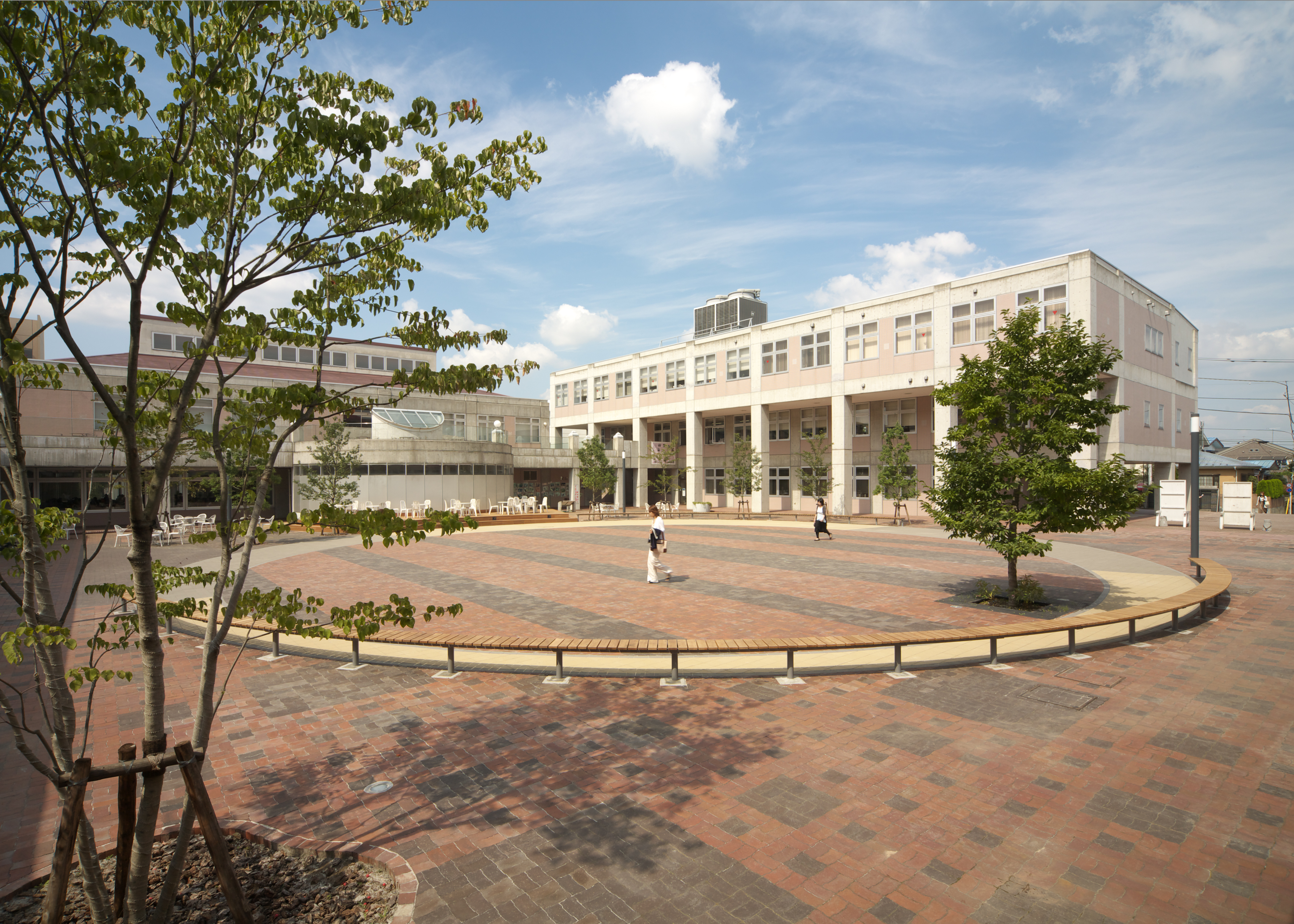 実践女子大学大坂上キャンパス